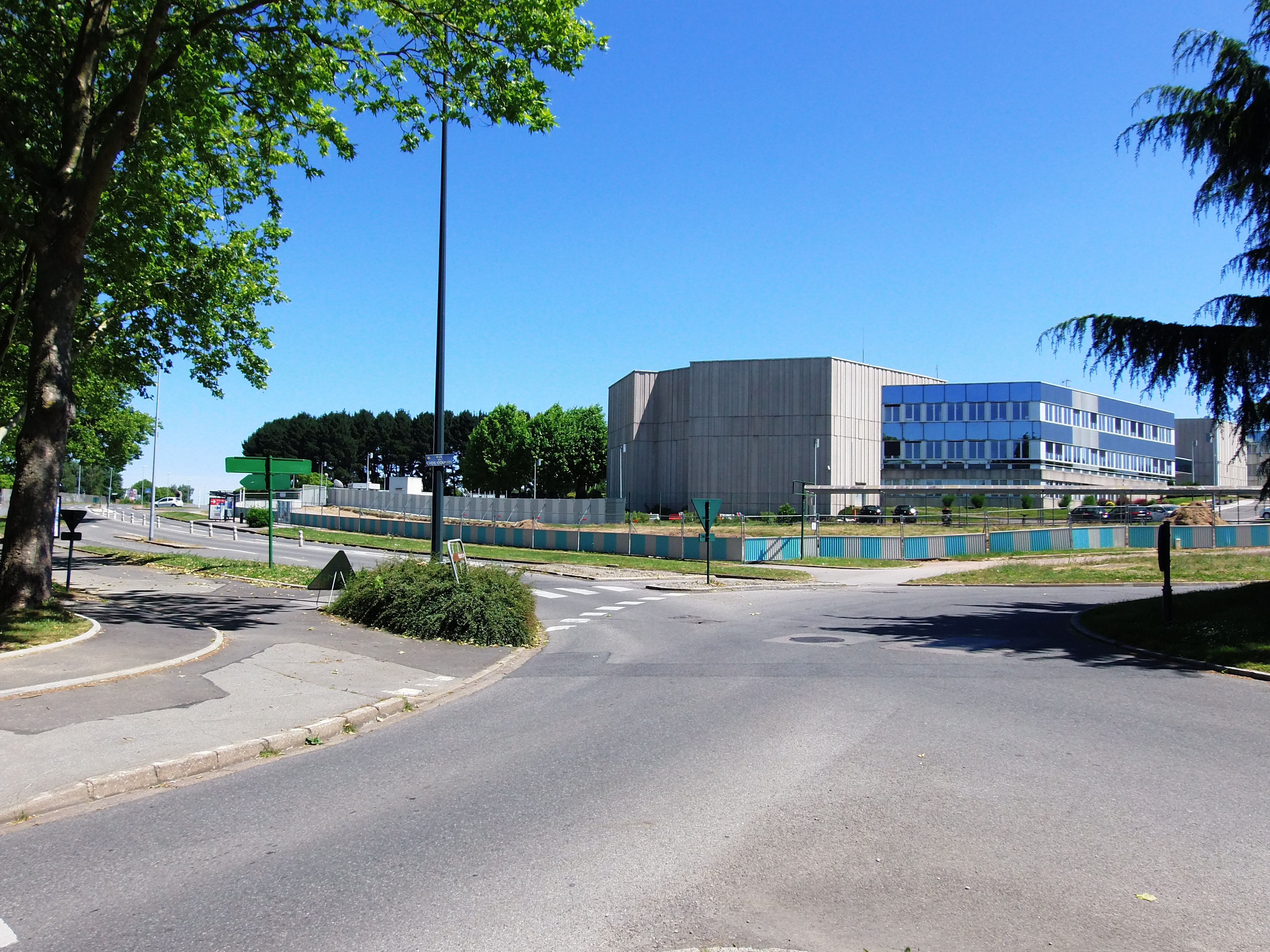 Début des travaux de la future station Atalante de la ligne B du métro de Rennes